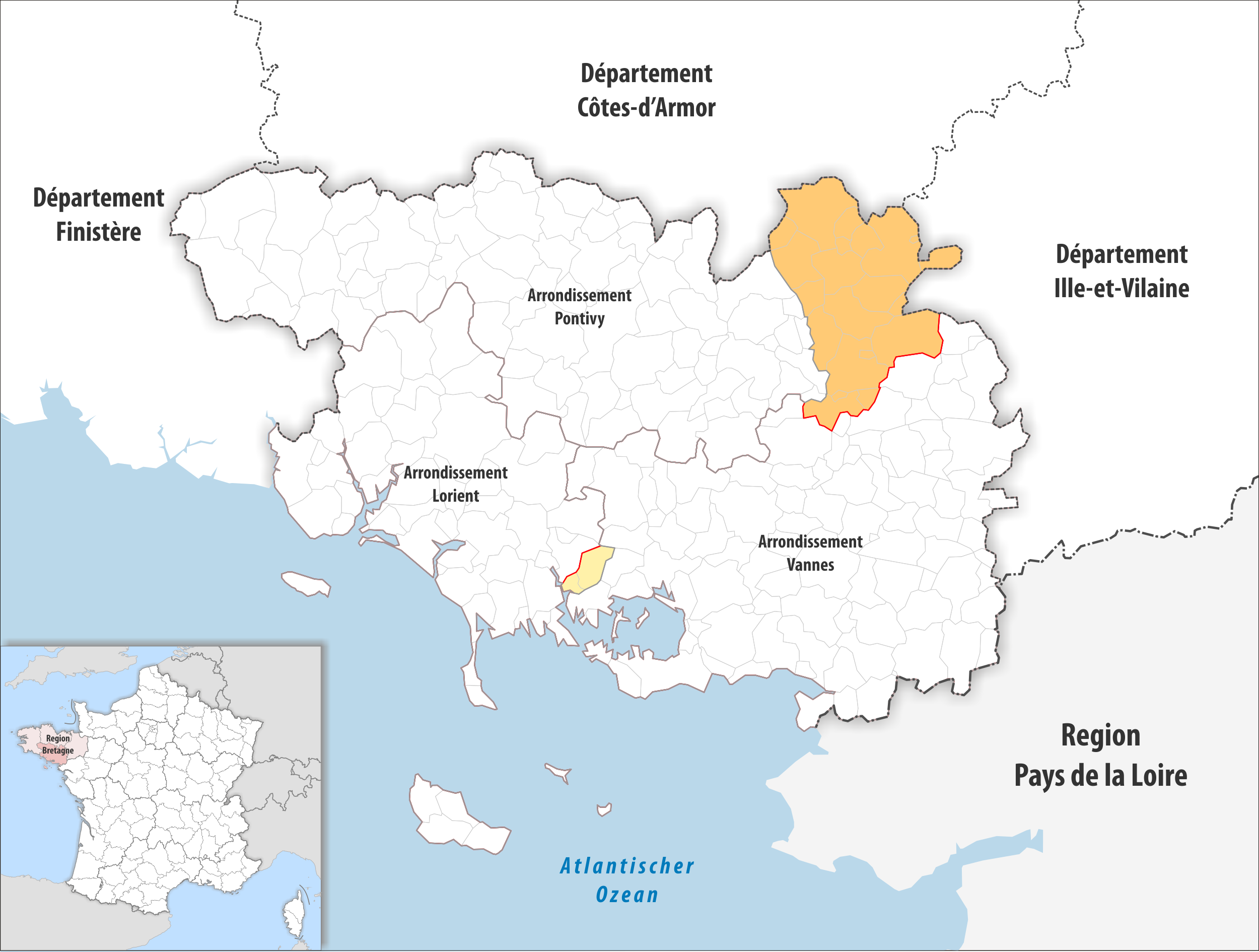 Arrondissements Anpassungen auf 2017 im Departement Morbihan